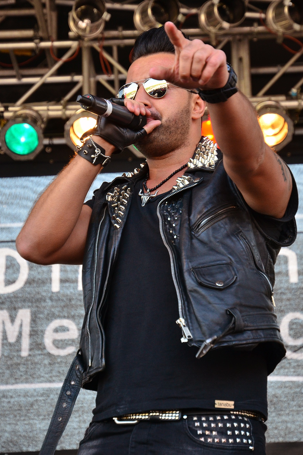 Cosimo Citiolo beim Bild-Renntag in Gelsenkirchen